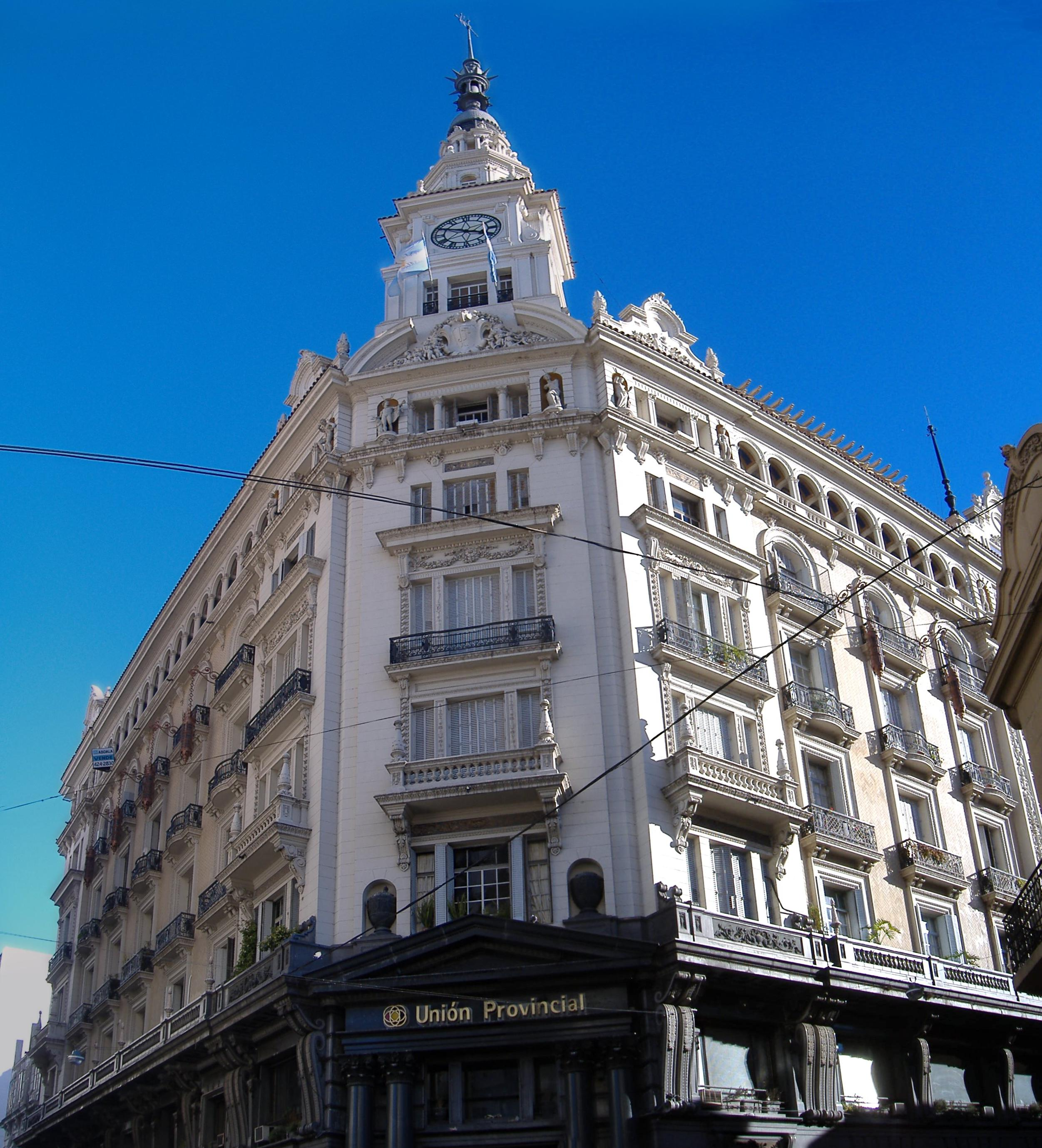 Palacio Fuentes, a historical building in Rosario, Argentina.